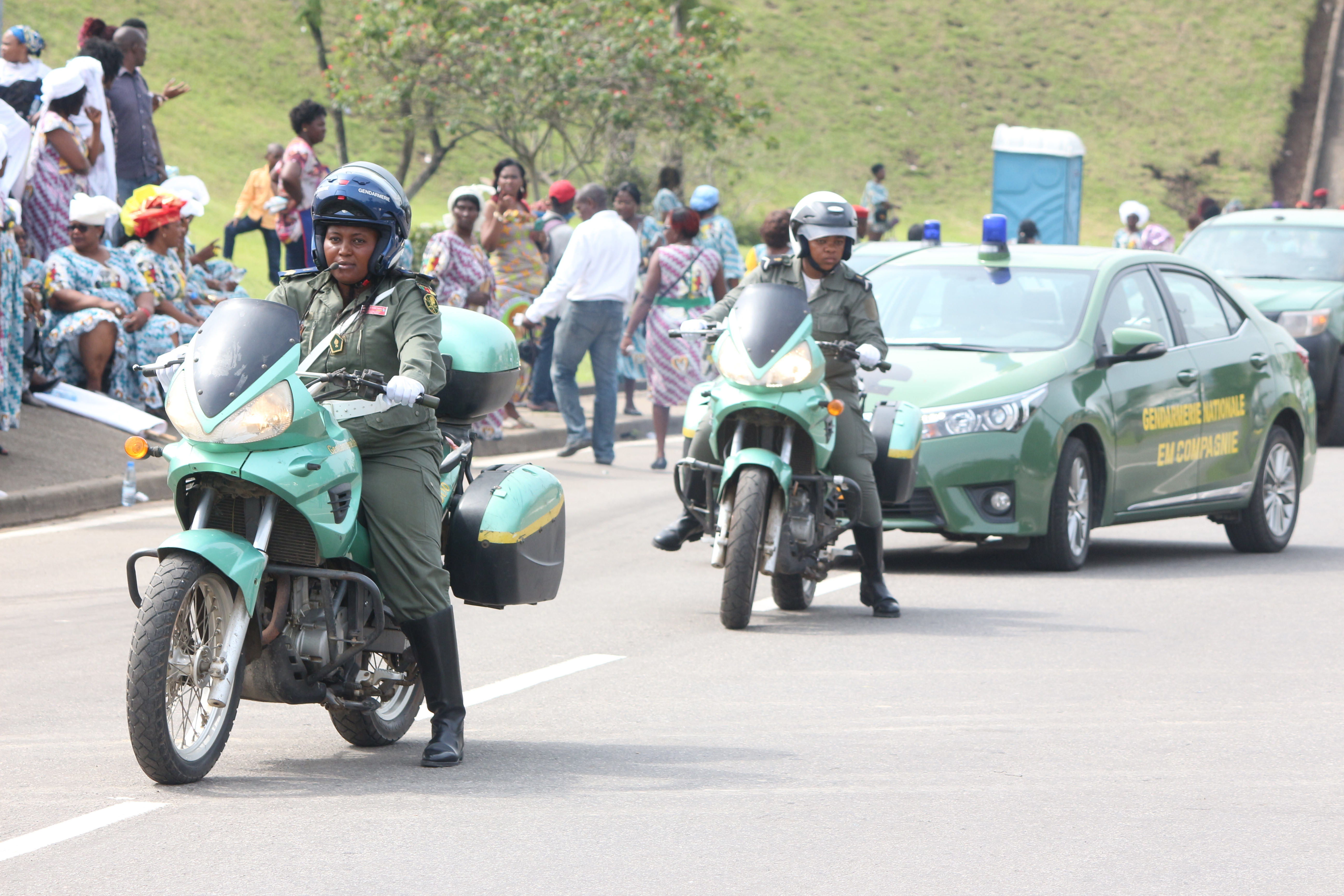 Femmes de la police camerounaise à moto pendant le défilé This is an image with the theme "Africa on the Move or Transport" from: Cameroon